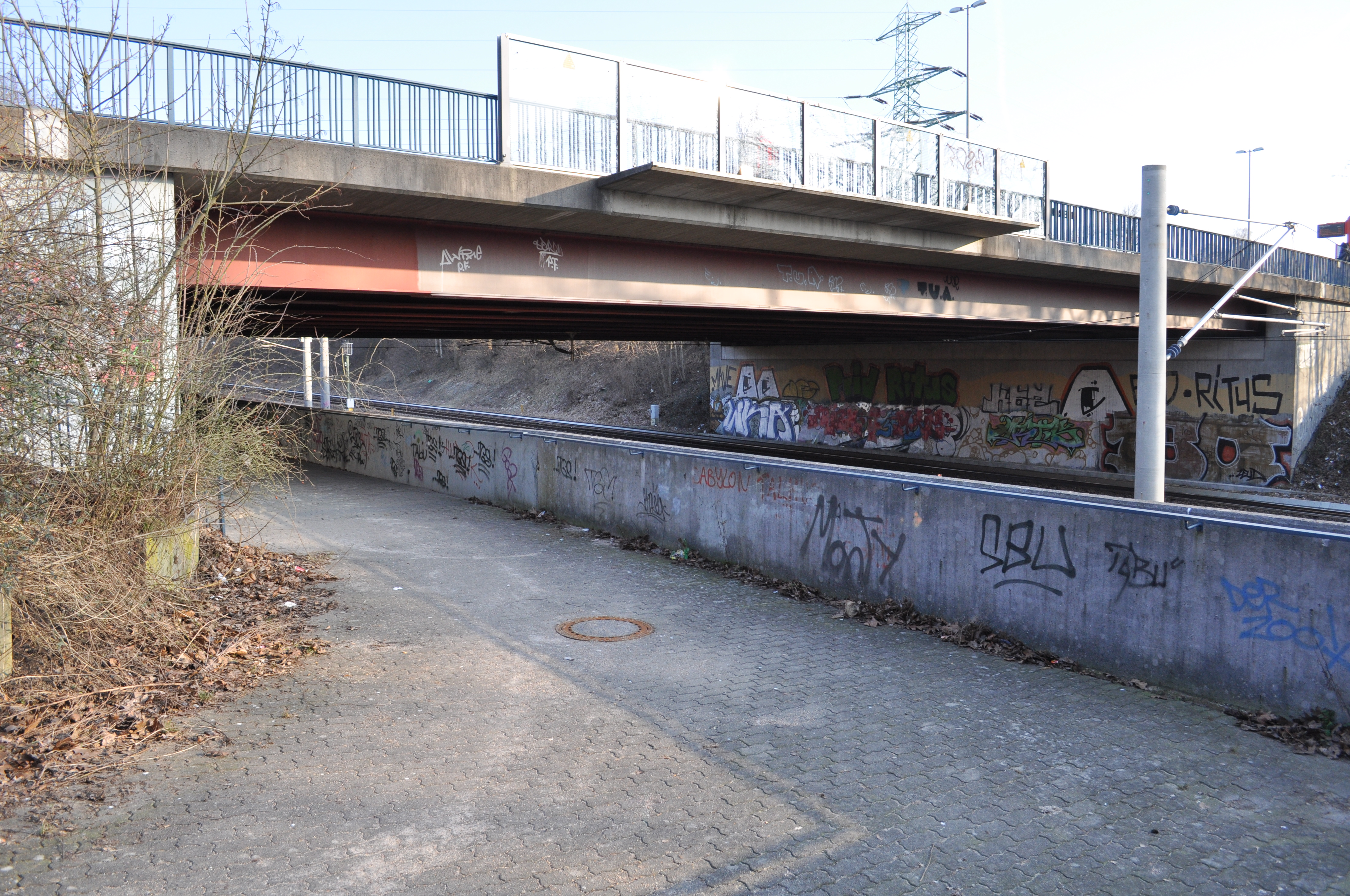 Unterführung an der Hebebrandbrücke in Hamburg.